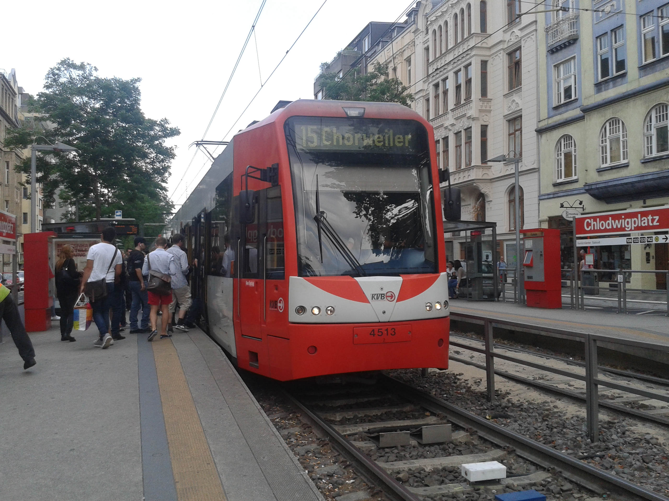 Dieses Fahrzeug des Typs Flexity Swift Nr. 4513 der Stadtbahn Köln hält auf dem Weg als Linie 15 nach Chorweiler an der Haltestelle Chlodwigplatz